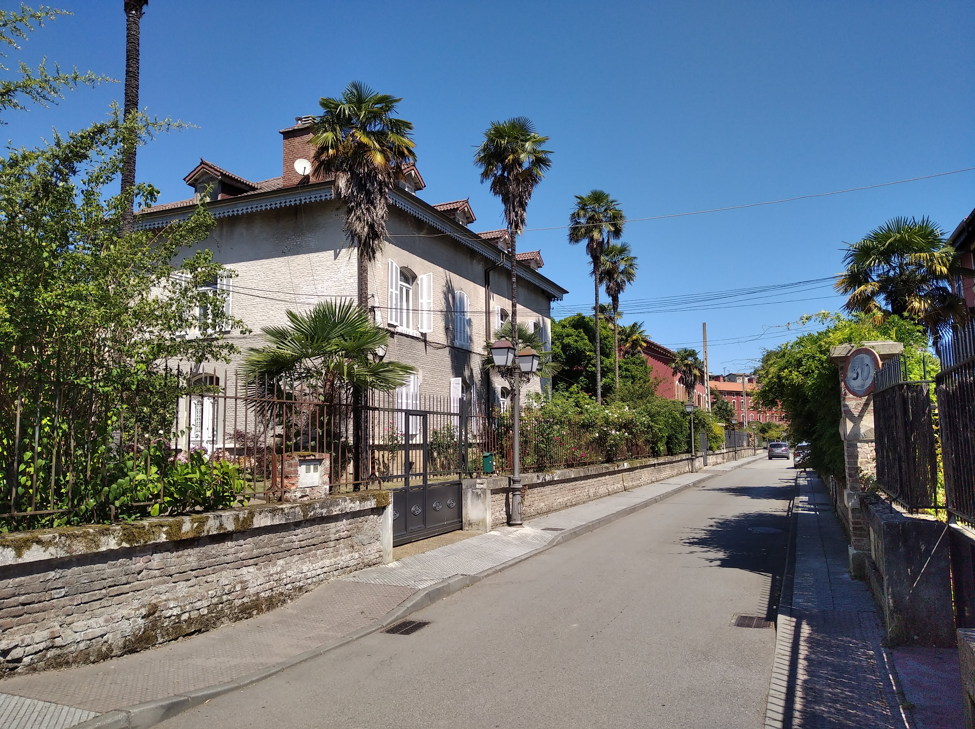 Casa de dirección en el poblado minero de Solvay, Siero, Asturias